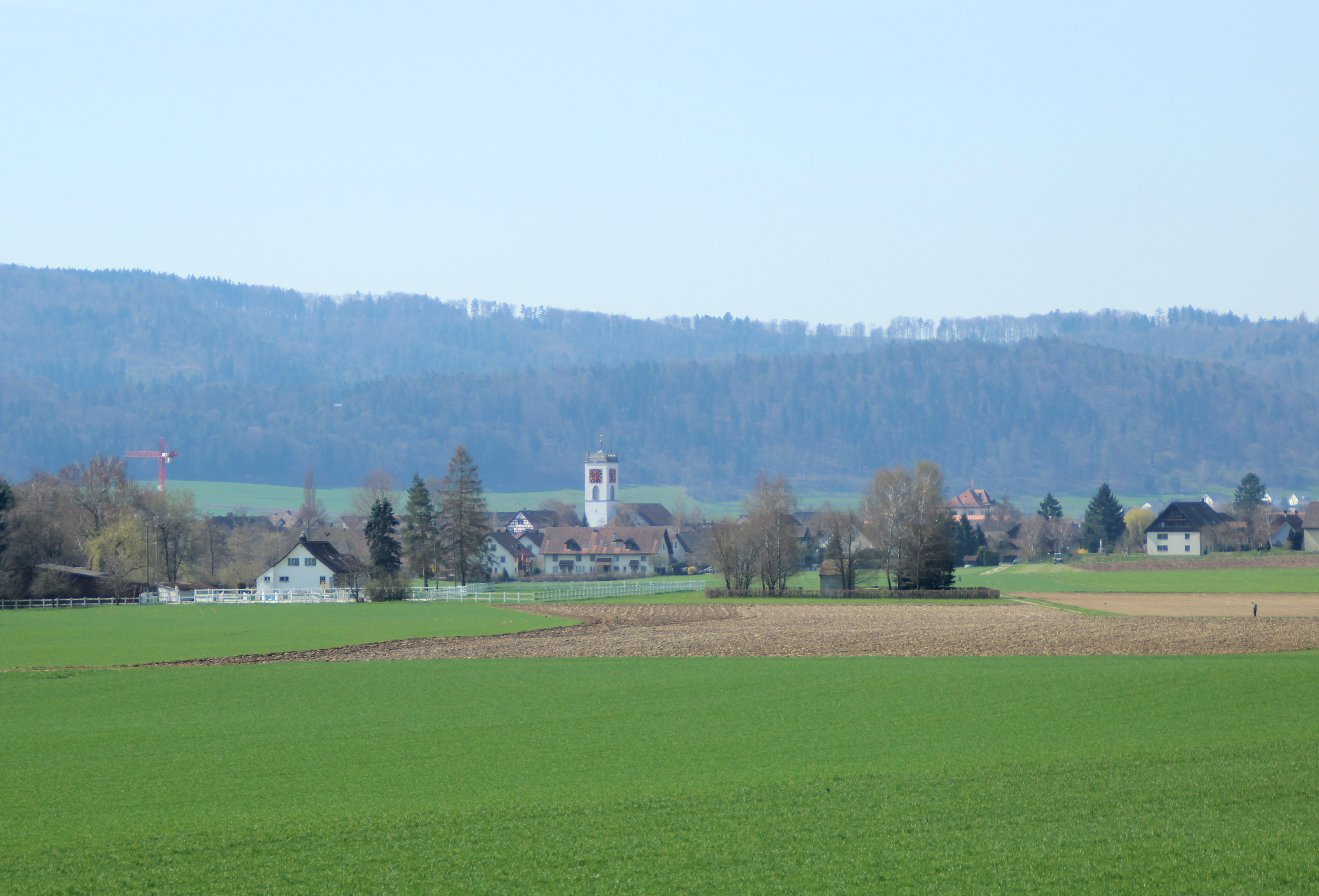 Neftenbach